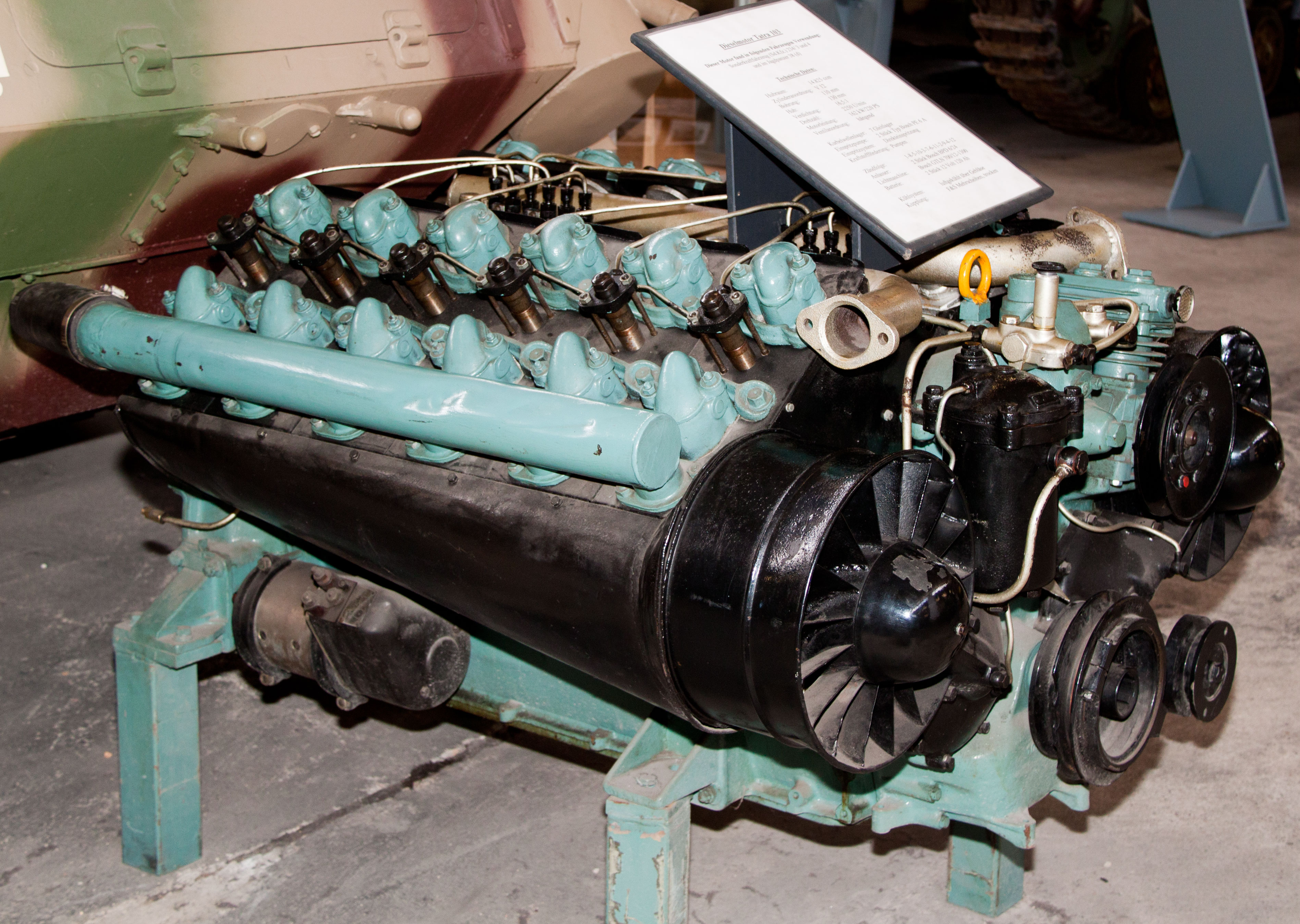 Dieselmotor som användes för SdKfz234/3-4 och Jagdpanzer 38